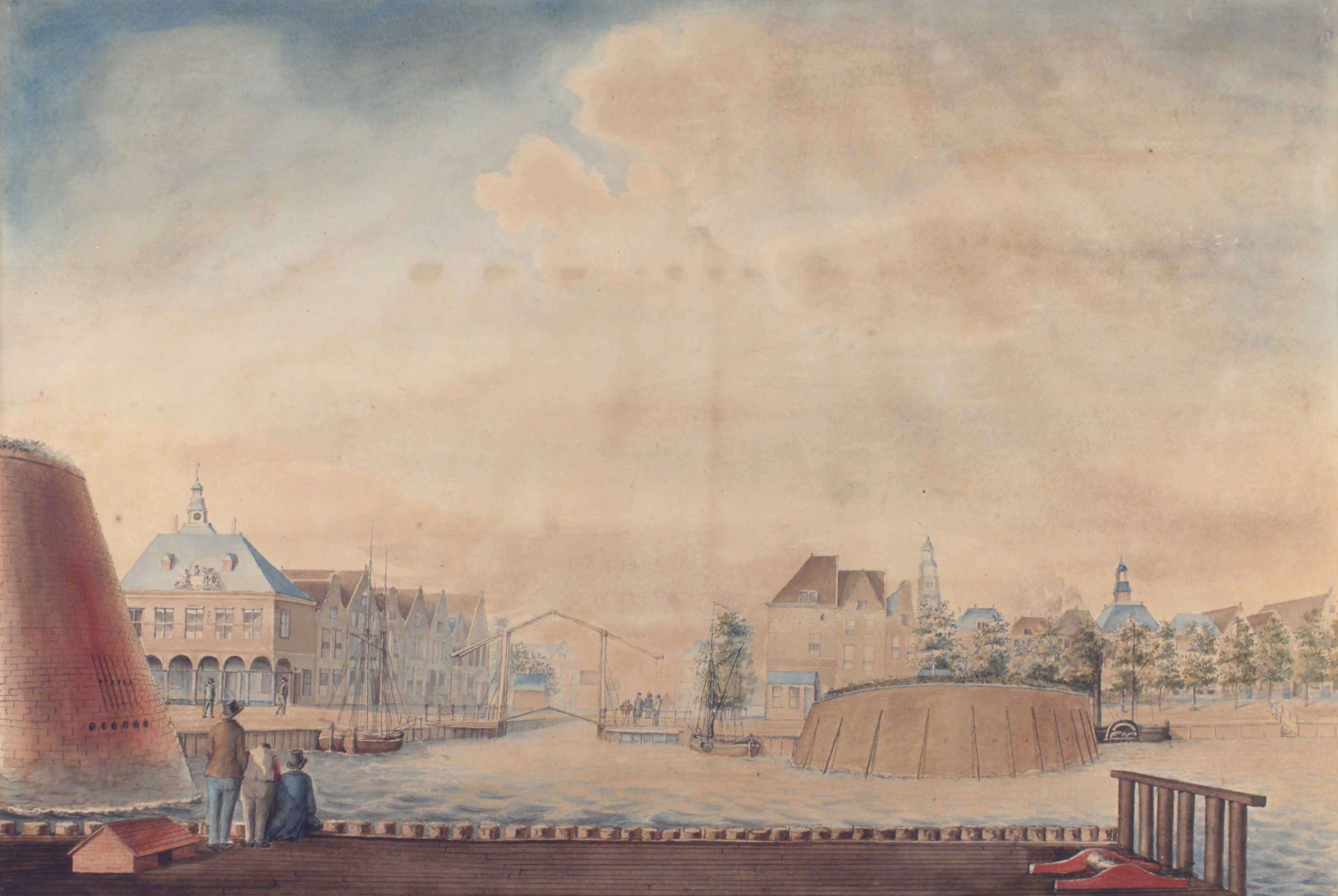 Beursplein, Engelse haven en omgeving, Vlissingen. 1829.